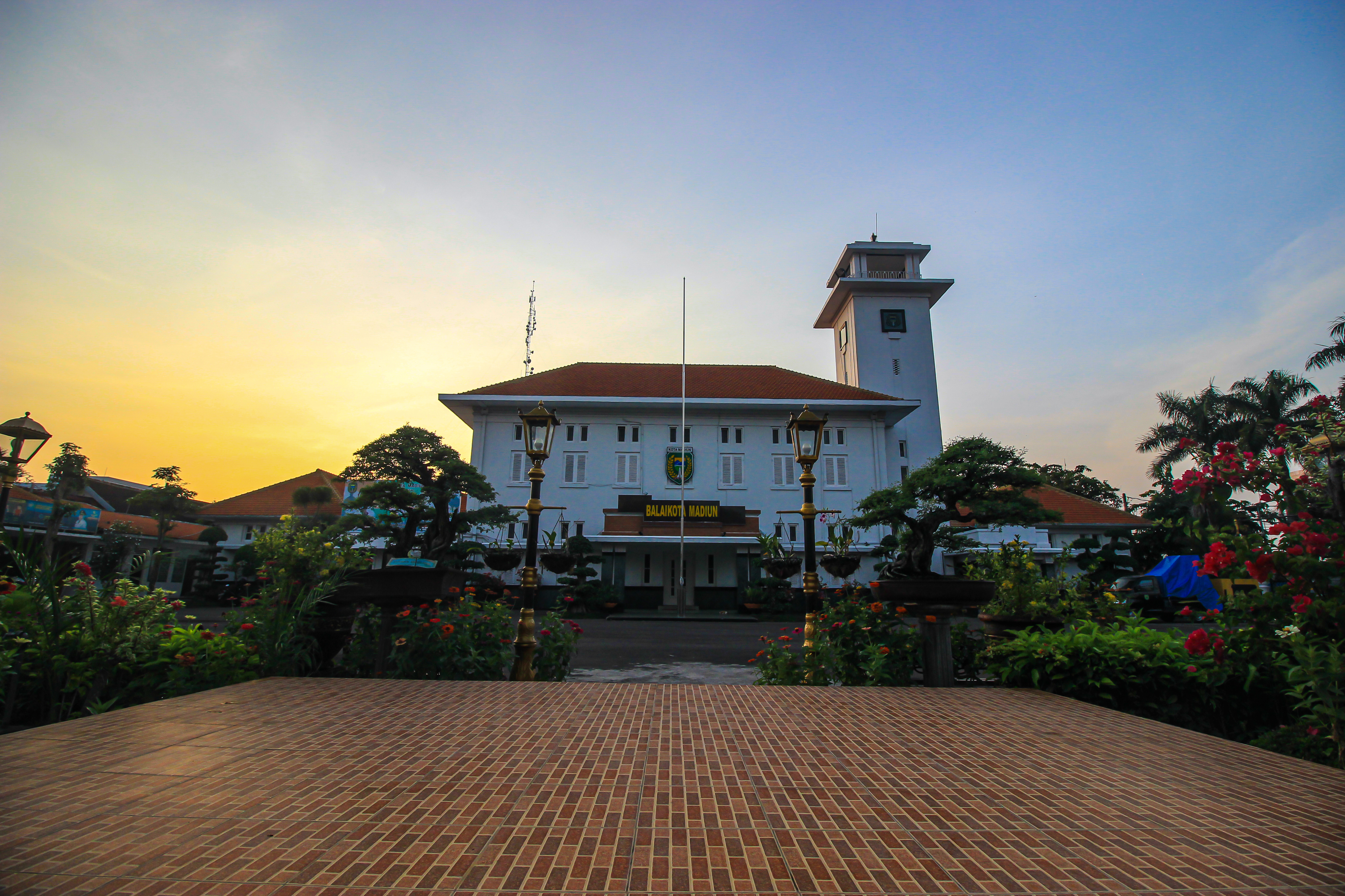 Kantor Pemerintahan Kota Madiun tahun 2020